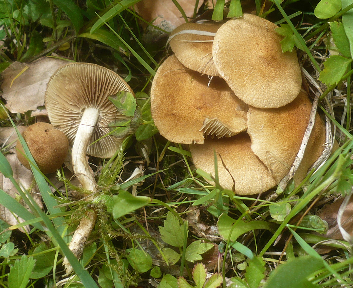 Inocybe dulcamara (Alb. & Schwein.) P. Kumm.